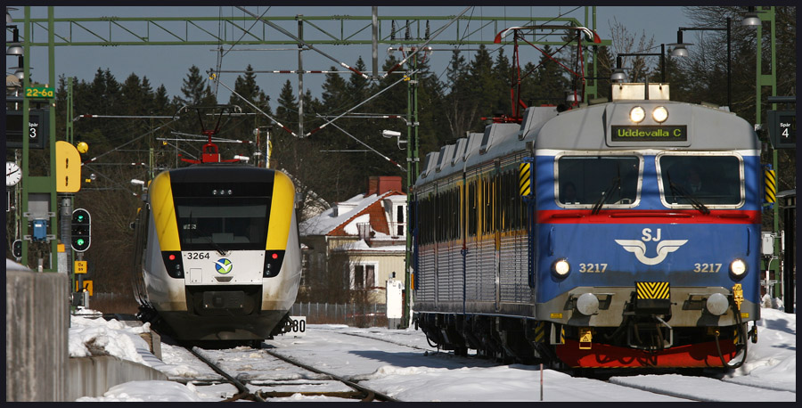 Två regionaltåg möts i Öxnered.